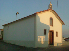 Capela de Nossa Senhora das Preces